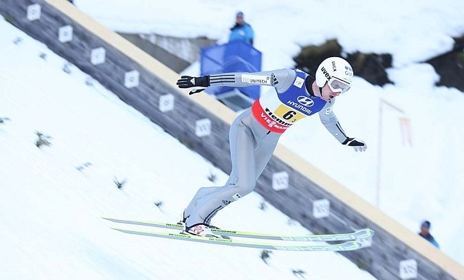 Konkurs drużynowy mężczyzn na skoczni K-120